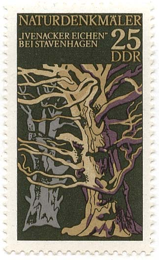 Ivenacker Eichen Datum: unbekannt Urheber: Deutsche Post der DDR Quelle